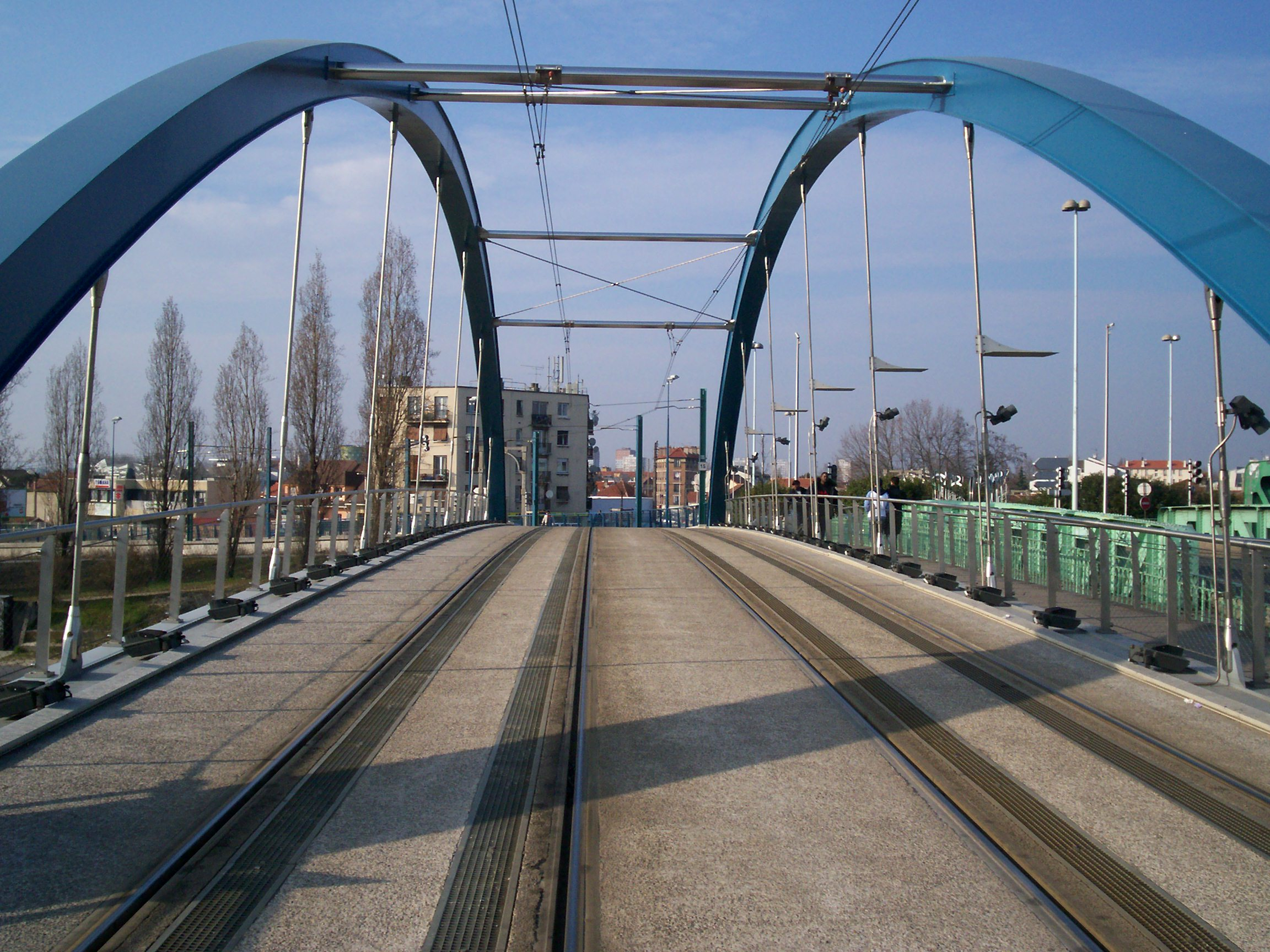 Pont de Bondy